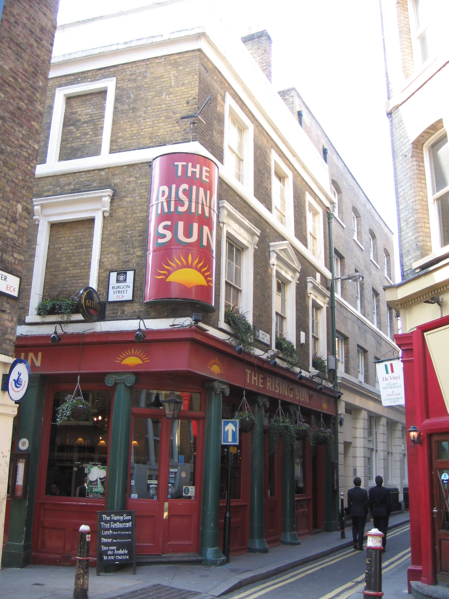 Rising Sun, Carter Lane